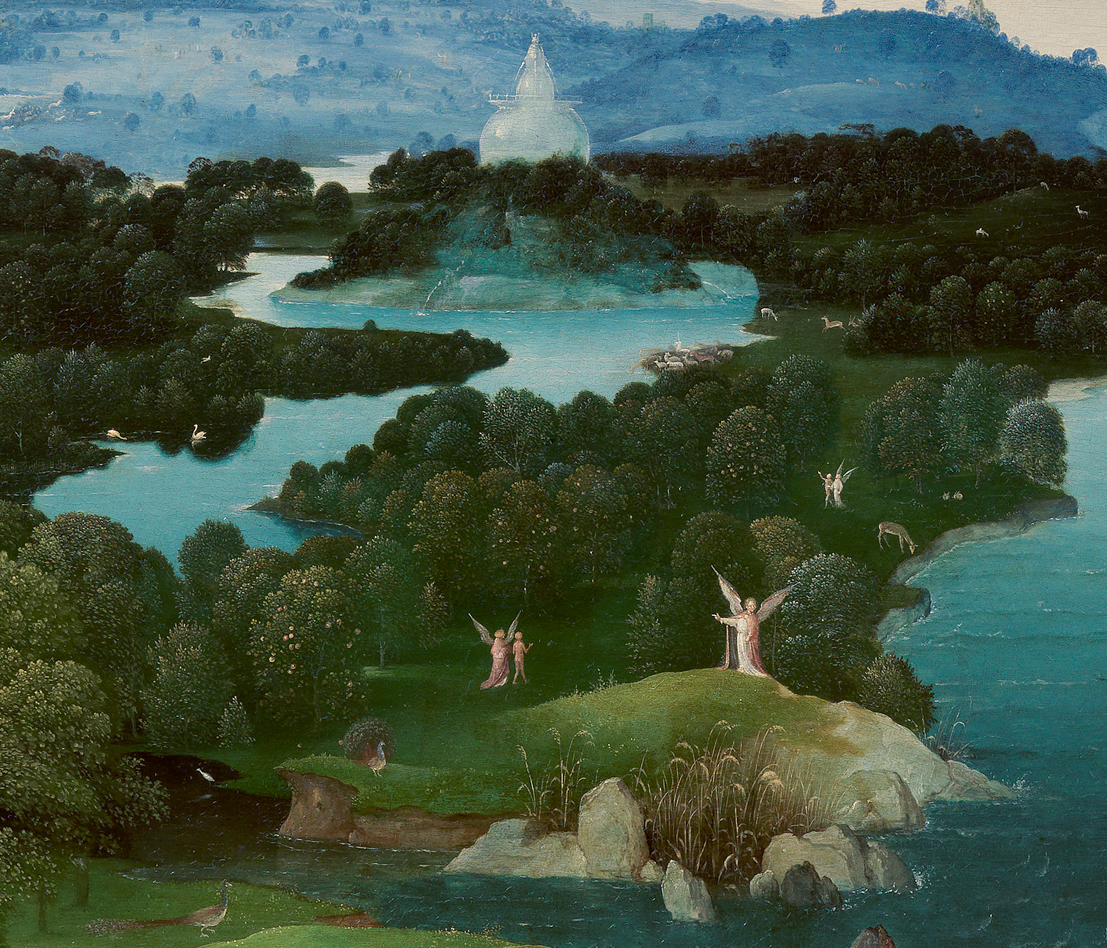 Joachim Patinier, Passage du Styx, détail : le paradis